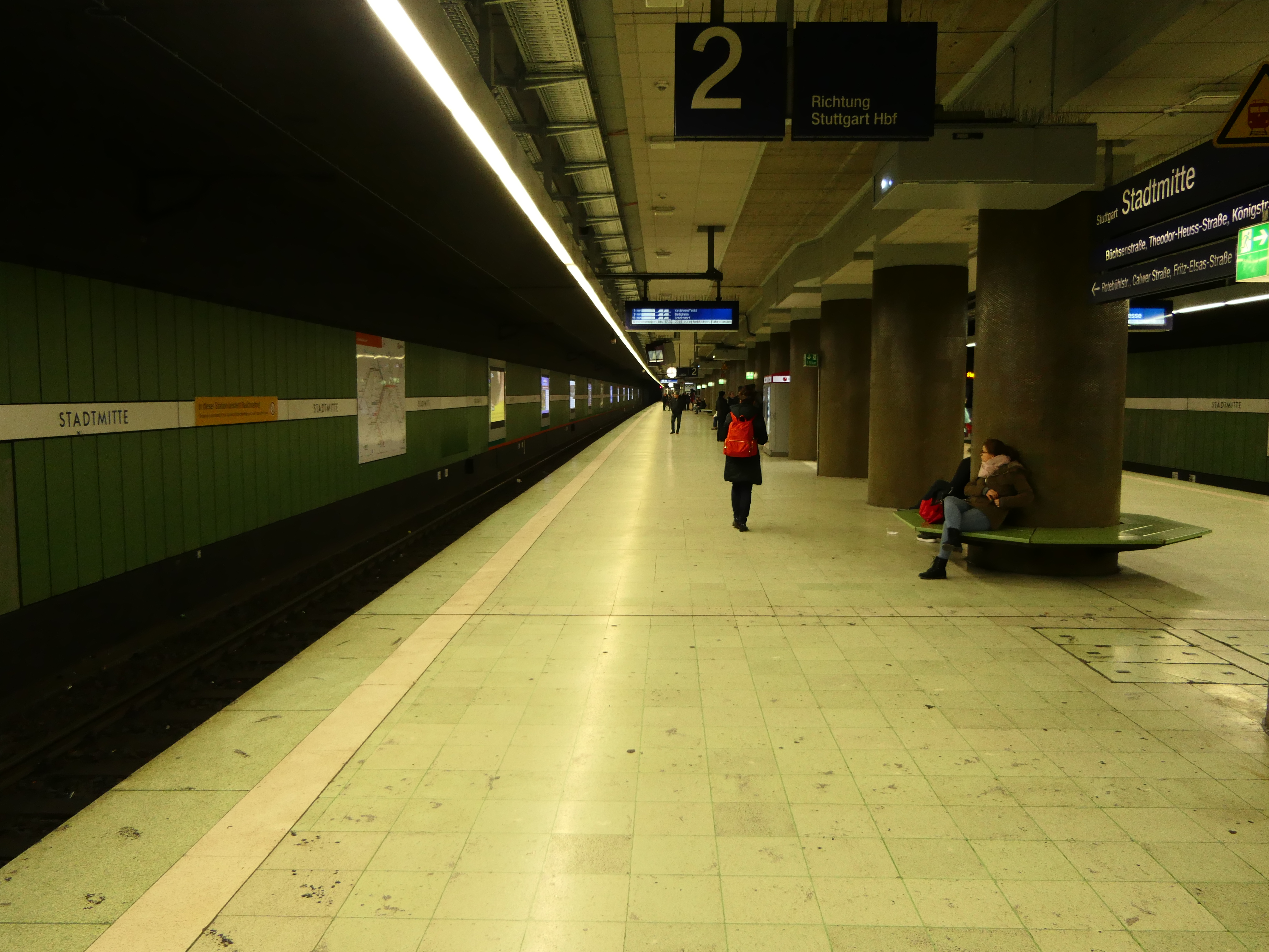 Der unterirdische S-Bahnhof Stadtmitte in Stuttgart.